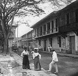 Cabildo Street, Intramuros, Manila.